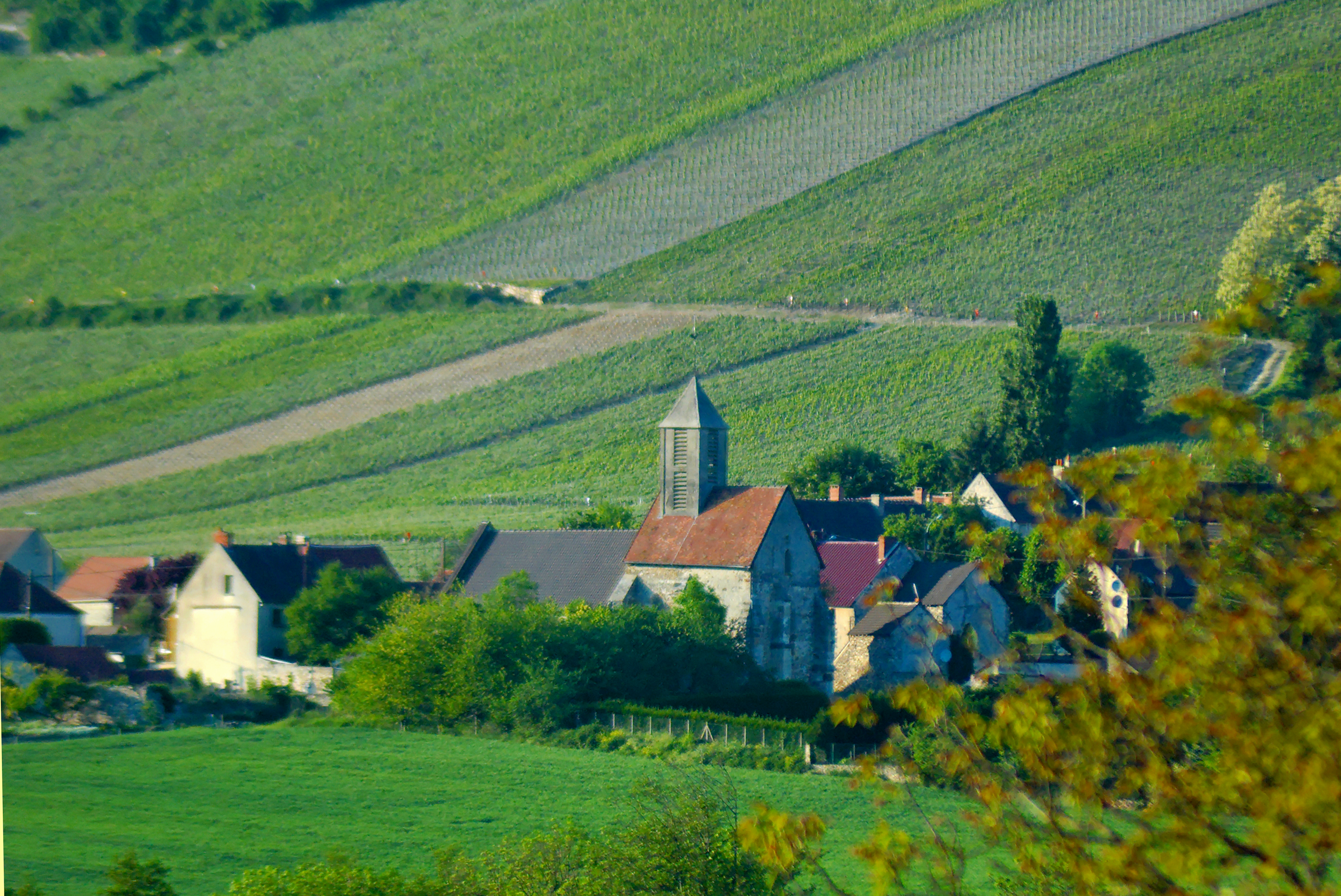 Le village de Monthurel.